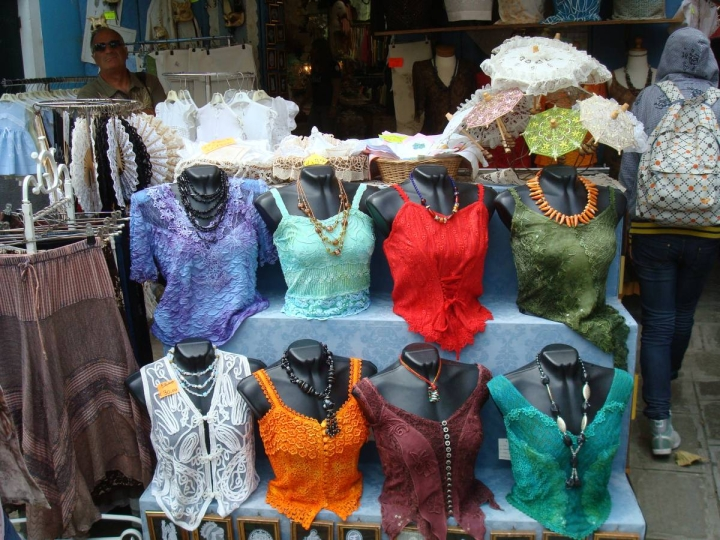 Ile de Burano à Venise - les dentelles typiques de la cité